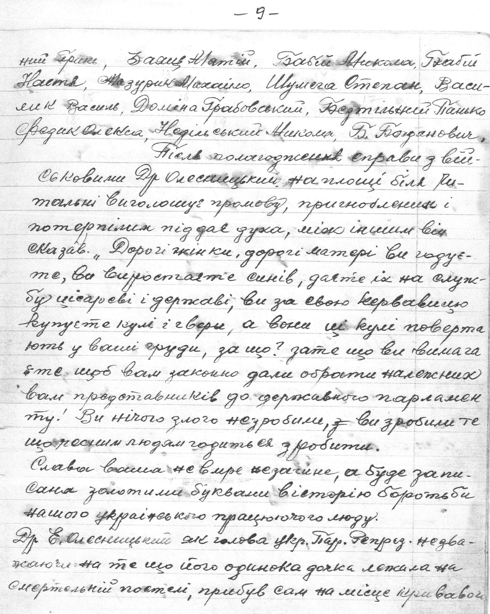 Копія рукопису